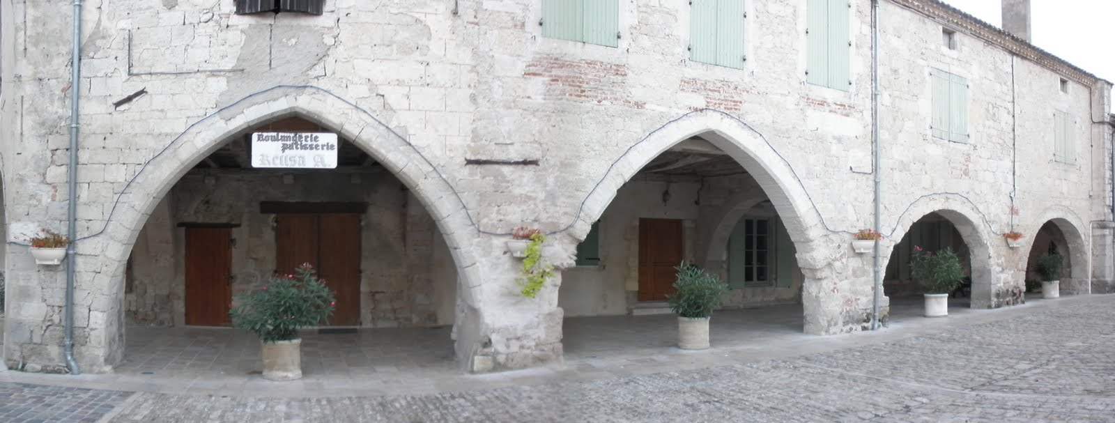 La place de la liberté à Castelsagrat (bastide) en octobre 2011